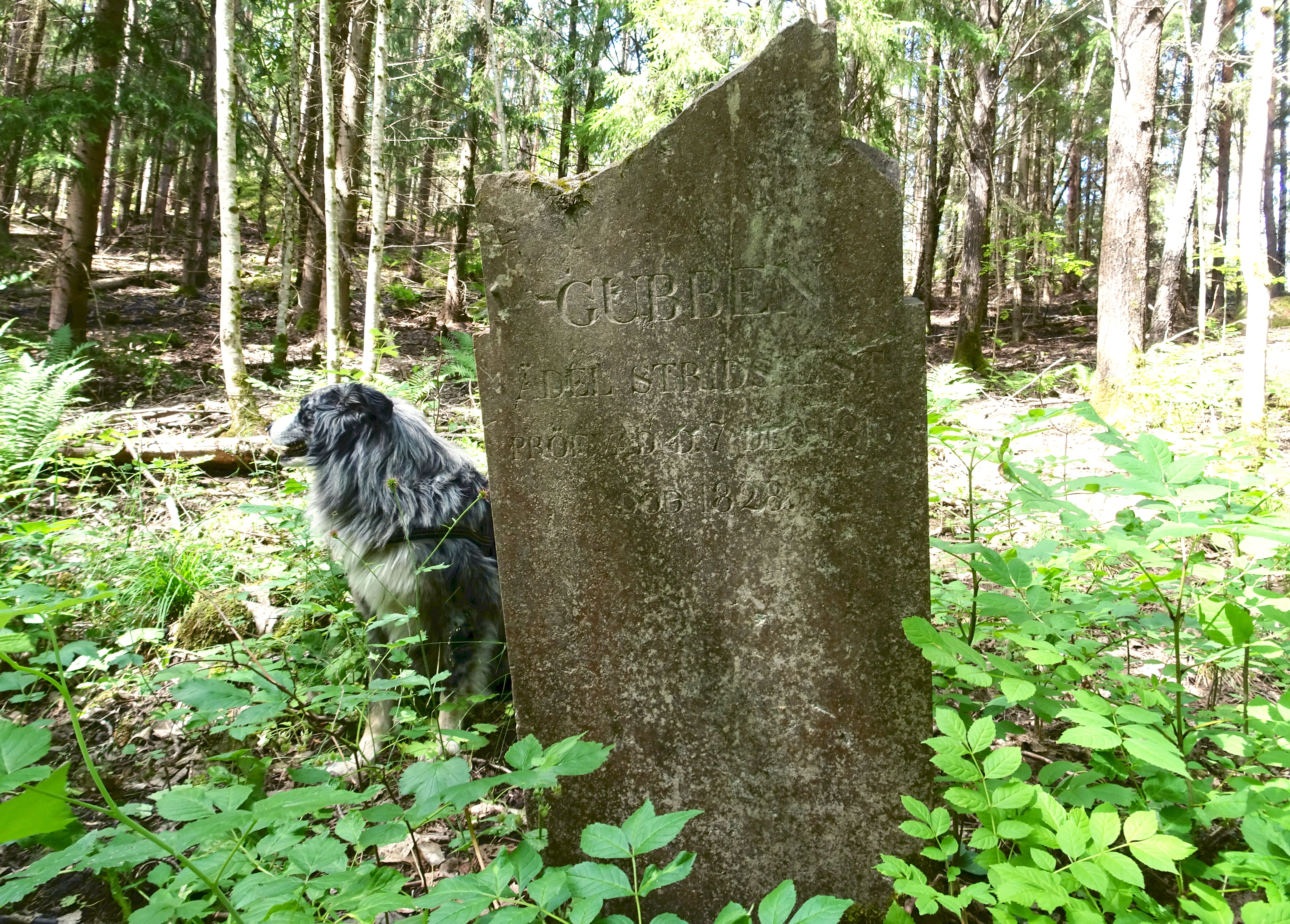 Hästgraven Skårby, Gubbens gravsten (RAÄ-nummer Salem 152:1). Gravsten för Anders Fredrik Skjöldebrands häst Gubben, inskriptionen lyder: Gubben - Ädel stridshäst - pröfvad - d - 7 - dec 1813 - död 1828